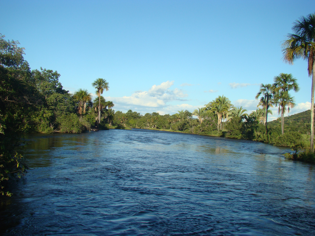 Rio Carinhanha, rio brasileiro que banha a Bahia e Minas.